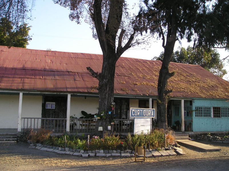 Estación Curtiduría, perteneciente al ramal ferroviario Talca-Constitución This is a photo of a national monument in Chile: 2085